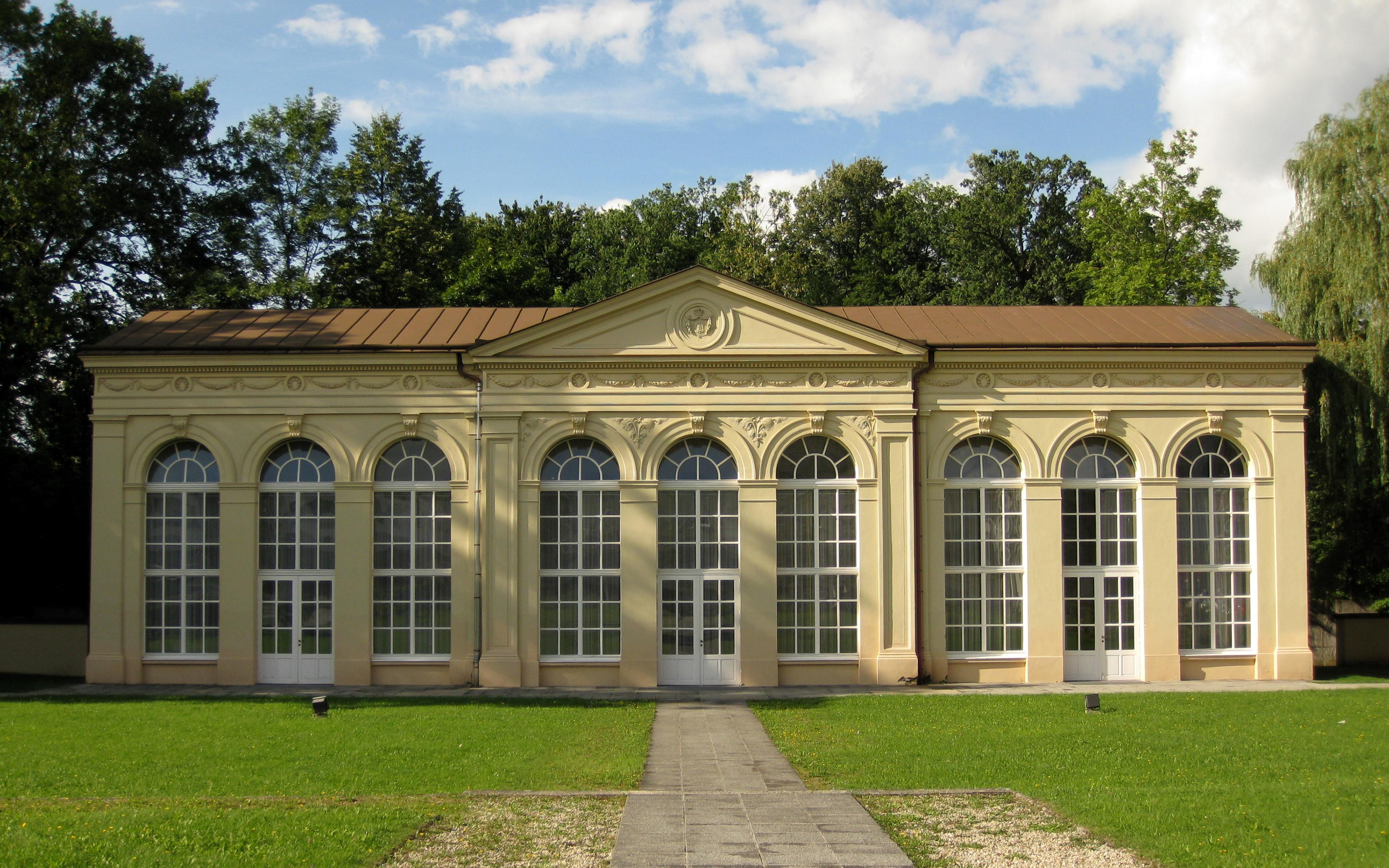 Ehem. Palmenhaus im Schlosspark Gmünd, Niederösterreich